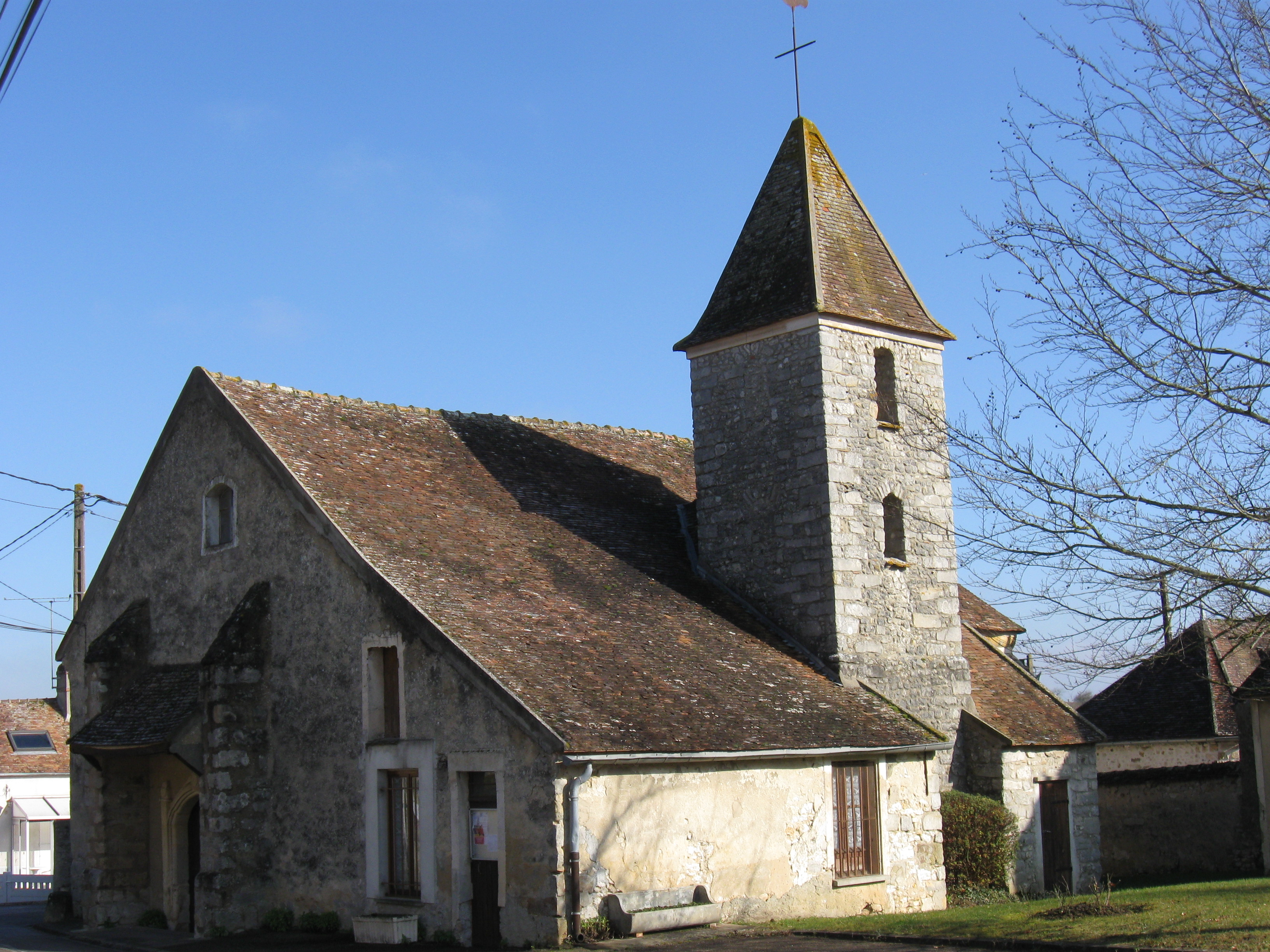 Église Sainte-Barbe de Noisy-Rudignon. (Seine-et-Marne, région Île-de-France).